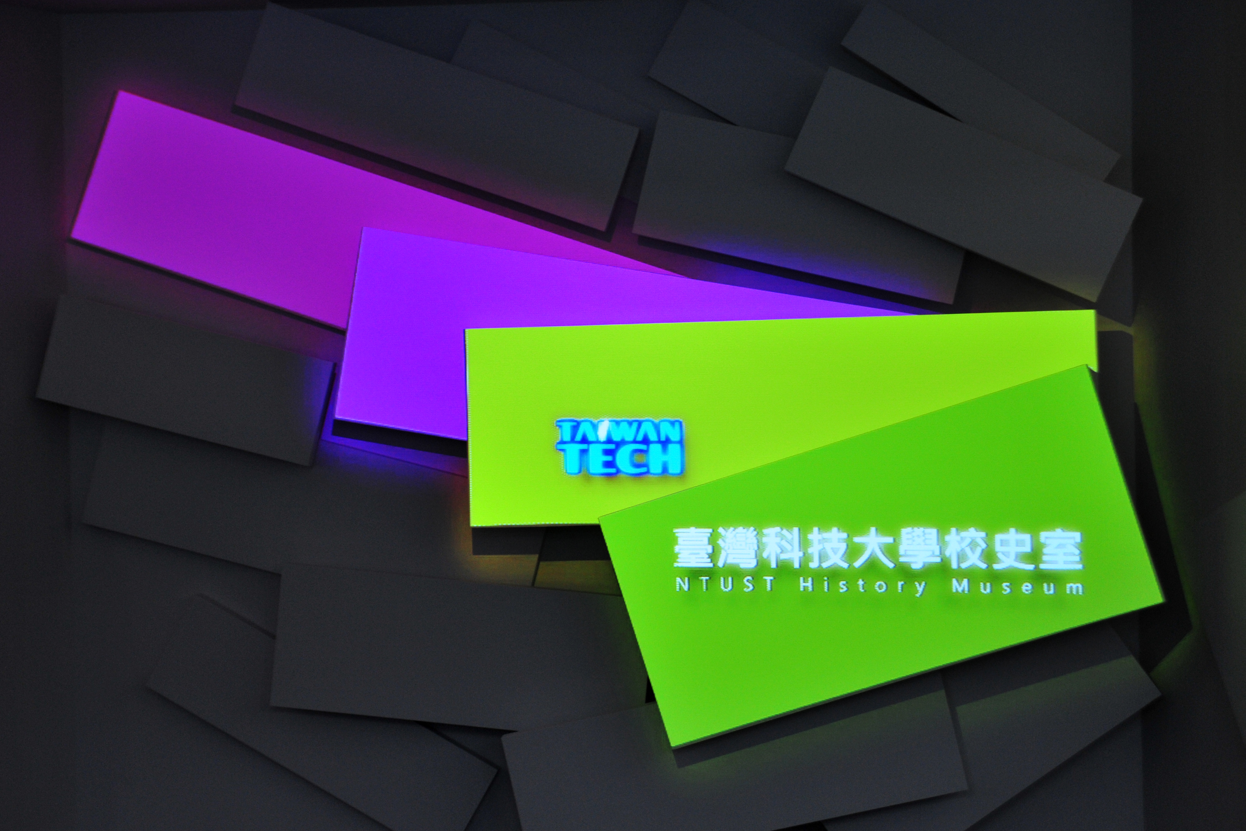 中文（台灣）: 國立臺灣科技大學校史室介紹